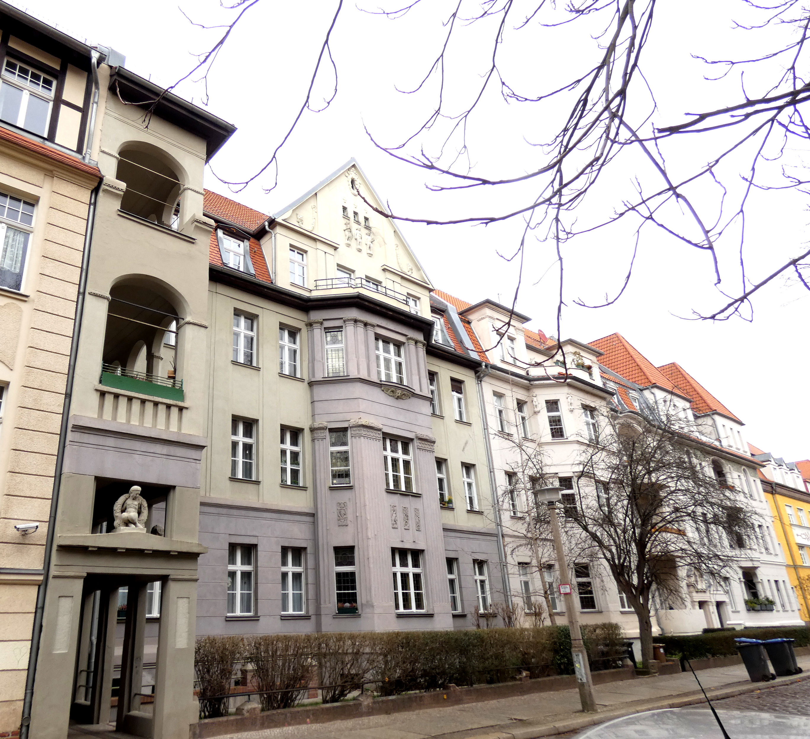 Häusergruppe Mozartstraße 19 bis 21, Halle (Saale), erbaut 1912/13, Architekt Paul Grempler